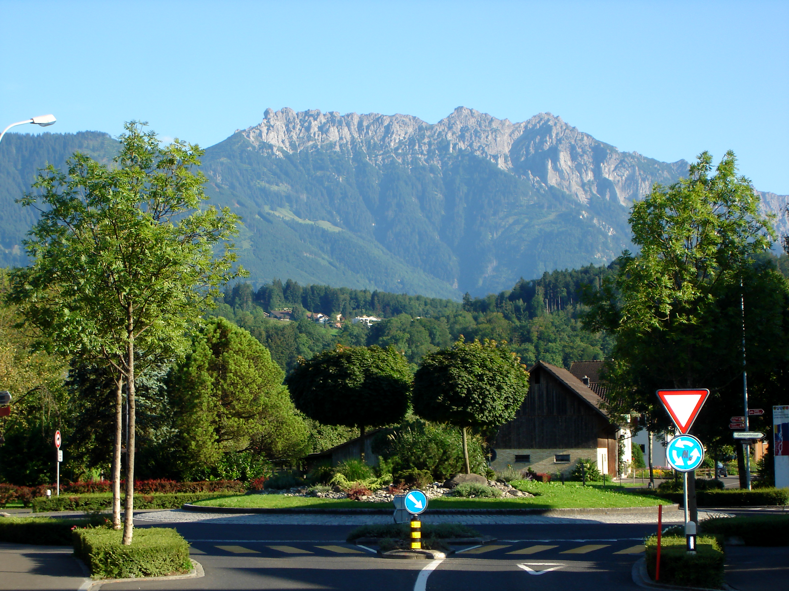 Liechtenstein: Ortseingang von Ruggell